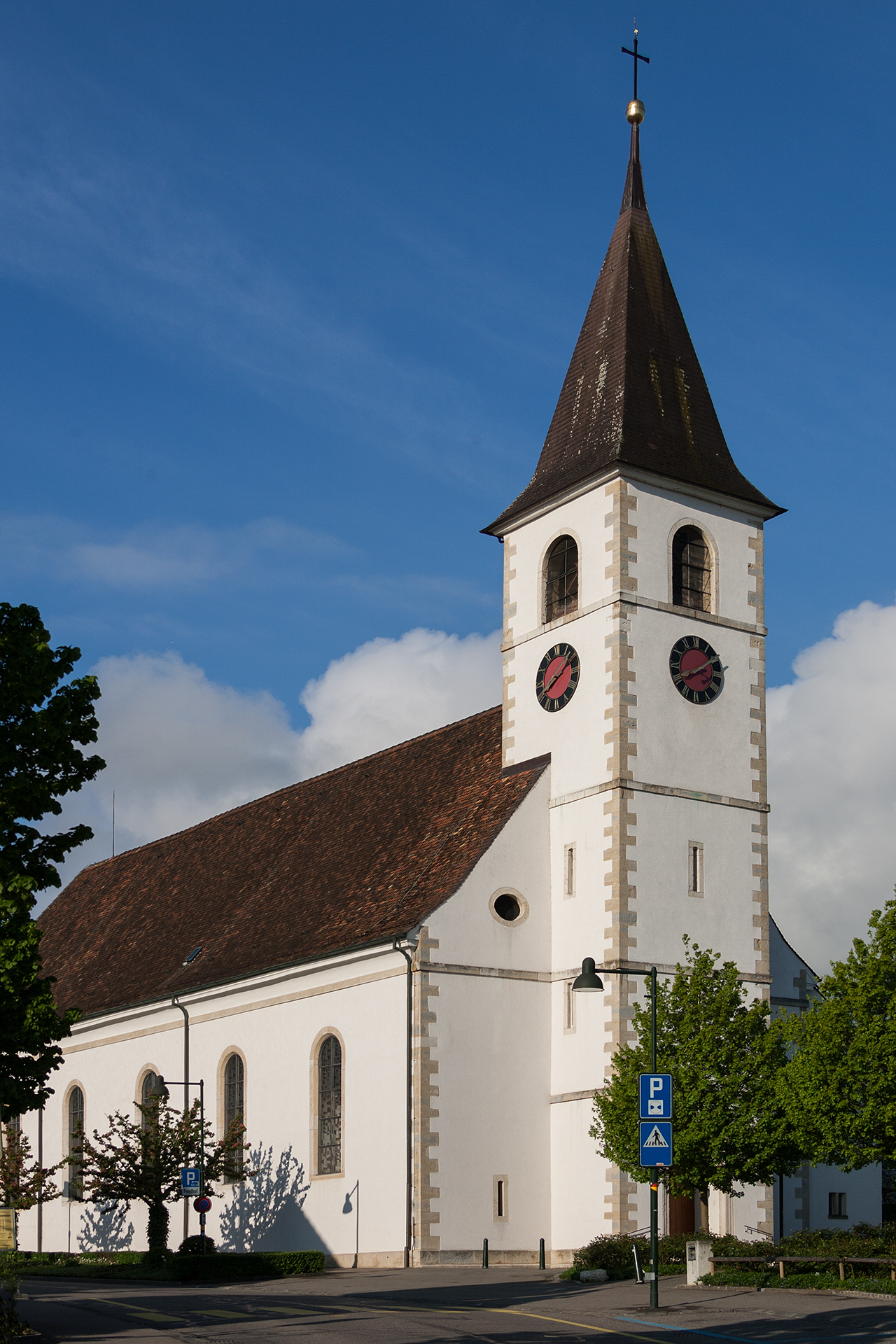 Katholische Kirche in Aesch (BL)